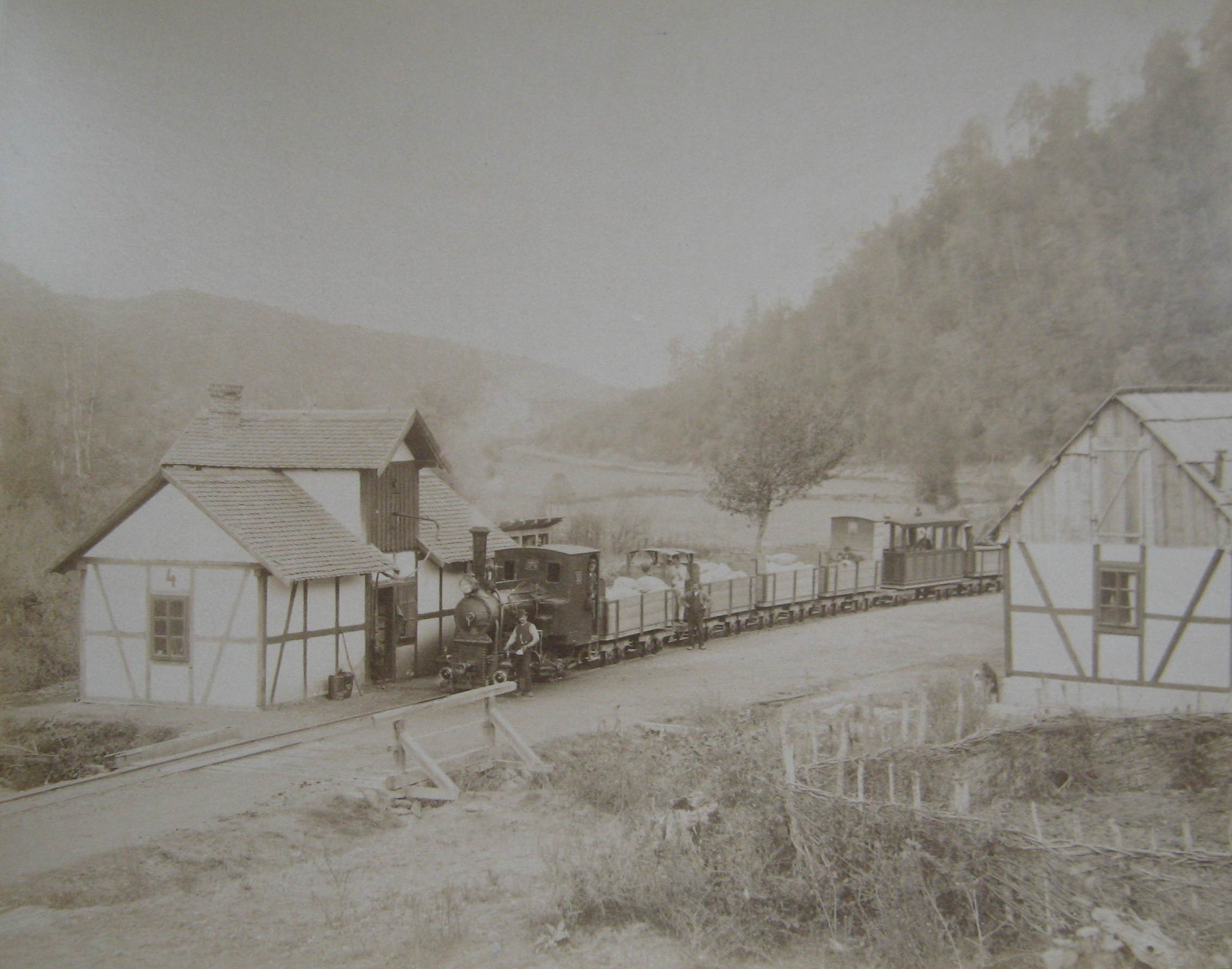 Arthur Koppel - Usorathalbahn, Länge 60 km, Bosnien